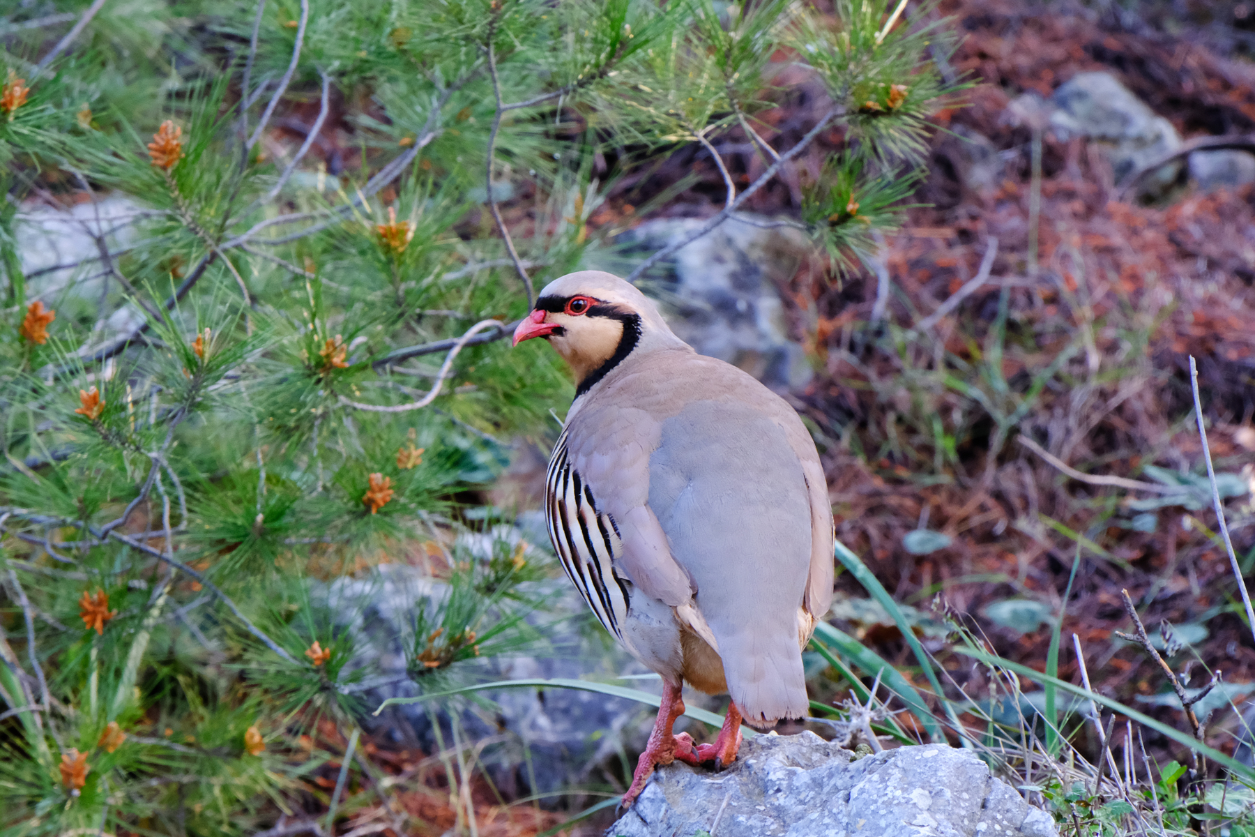 Rebhuhn auf Angistri